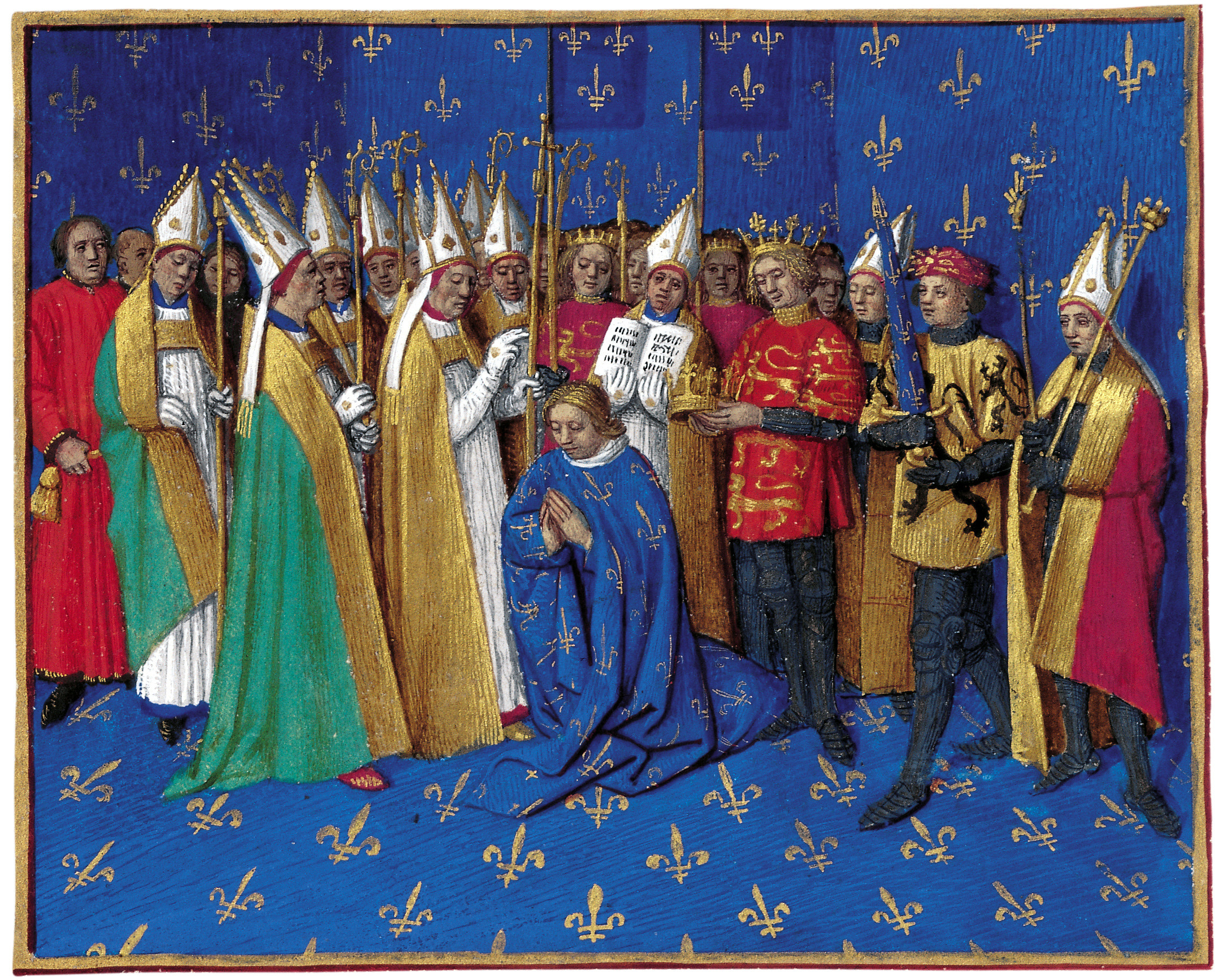 Couronnement de Philippe Auguste Grandes Chroniques de France, enluminées par Jean Fouquet, Tours, vers 1455-1460, Paris, BnF, département des Manuscrits, Français 6465, fol. 212v. (Premier Livre de Philippe Auguste) Le 1er novembre 1179, à Reims, Philippe Auguste est couronné par l'archevêque Guillaume de Champagne, en présence de Henri Court-Mantel, du comte de Flandre, de l'évêque de Langres, des prélats et des barons du royaume.